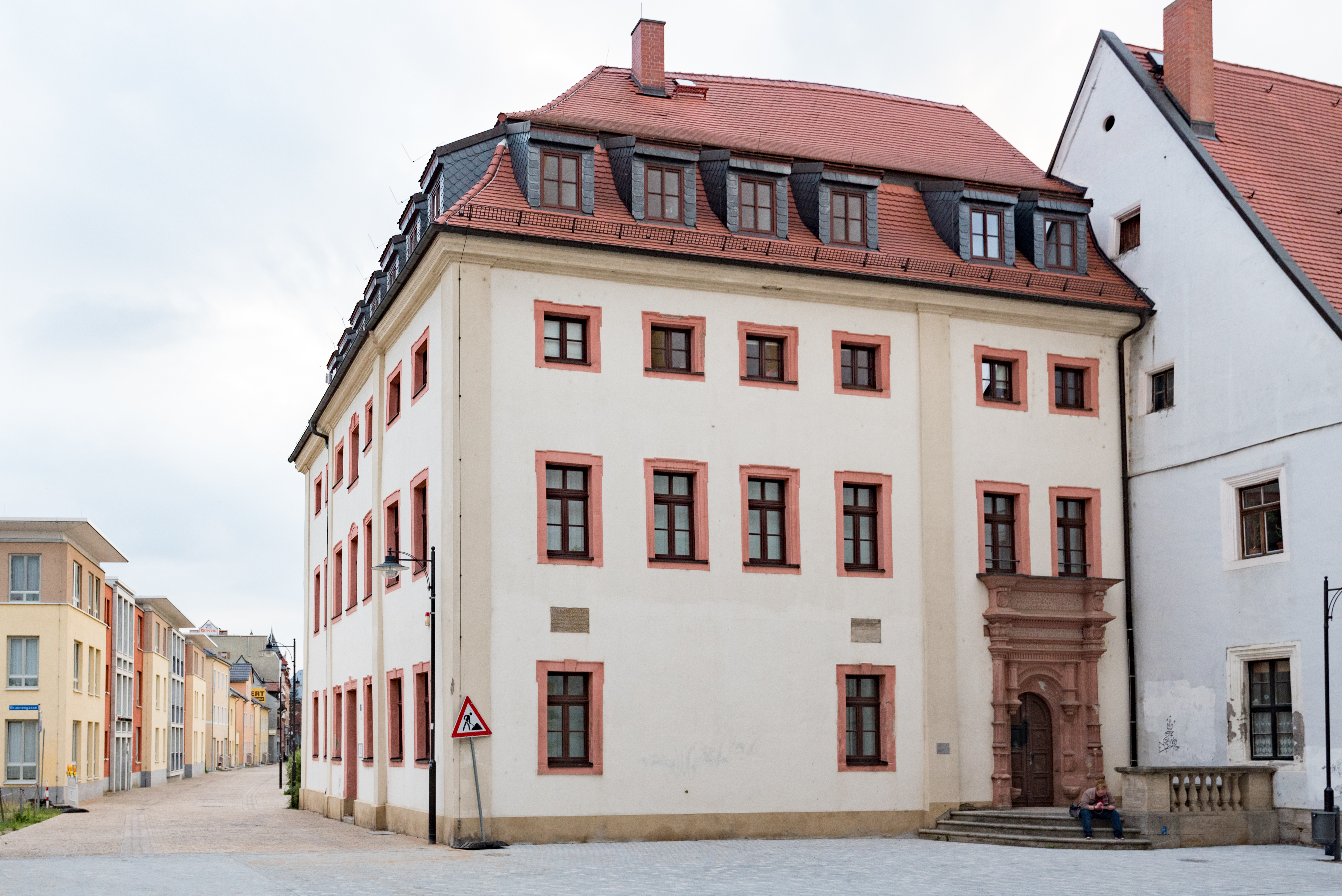 Weißenfels, Marienstraße 1a